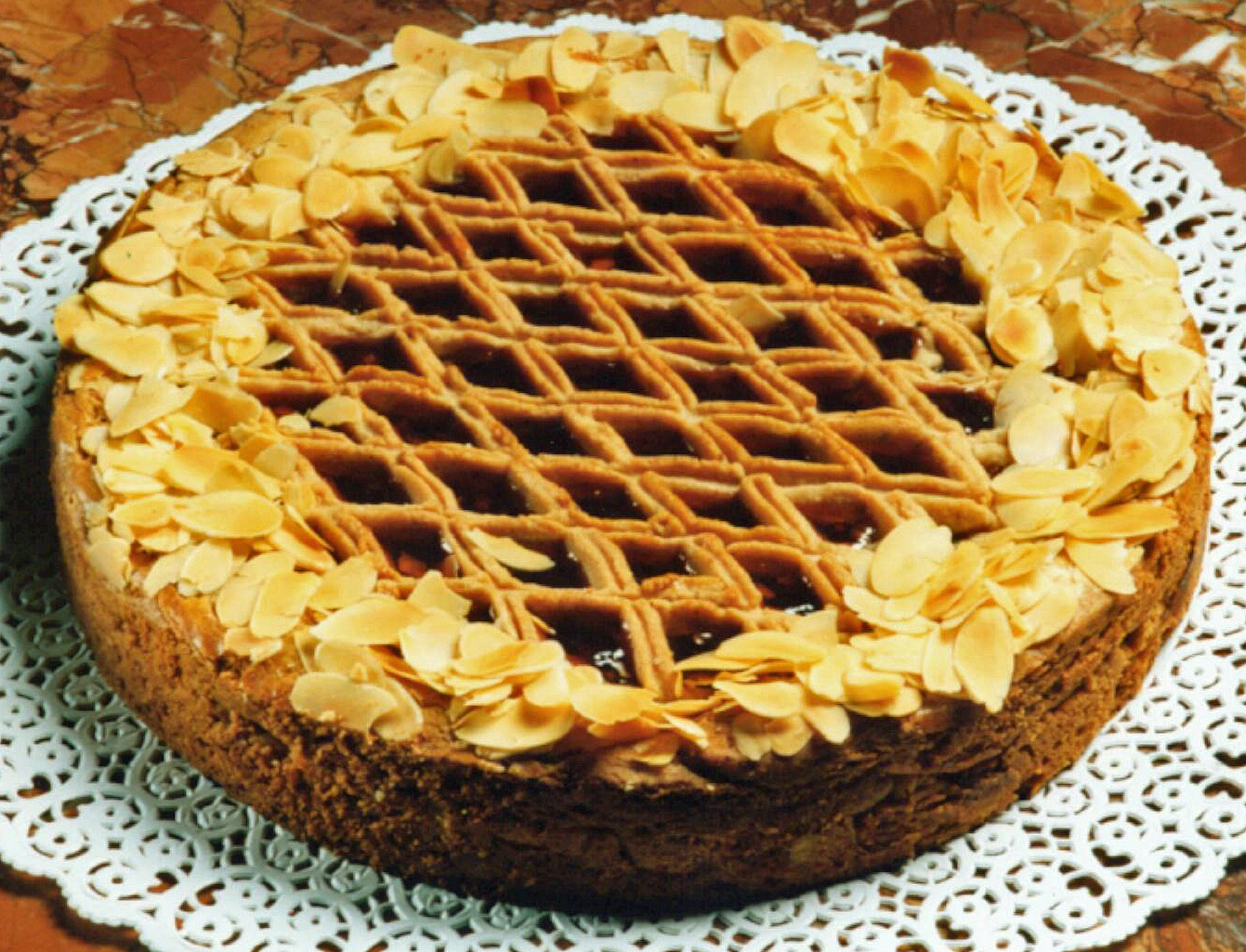 Linzer Torte. von Leo Jindrak(Hersteller) dankenswerterweise als freies bild zur verfügung gestellt, GNU FDL